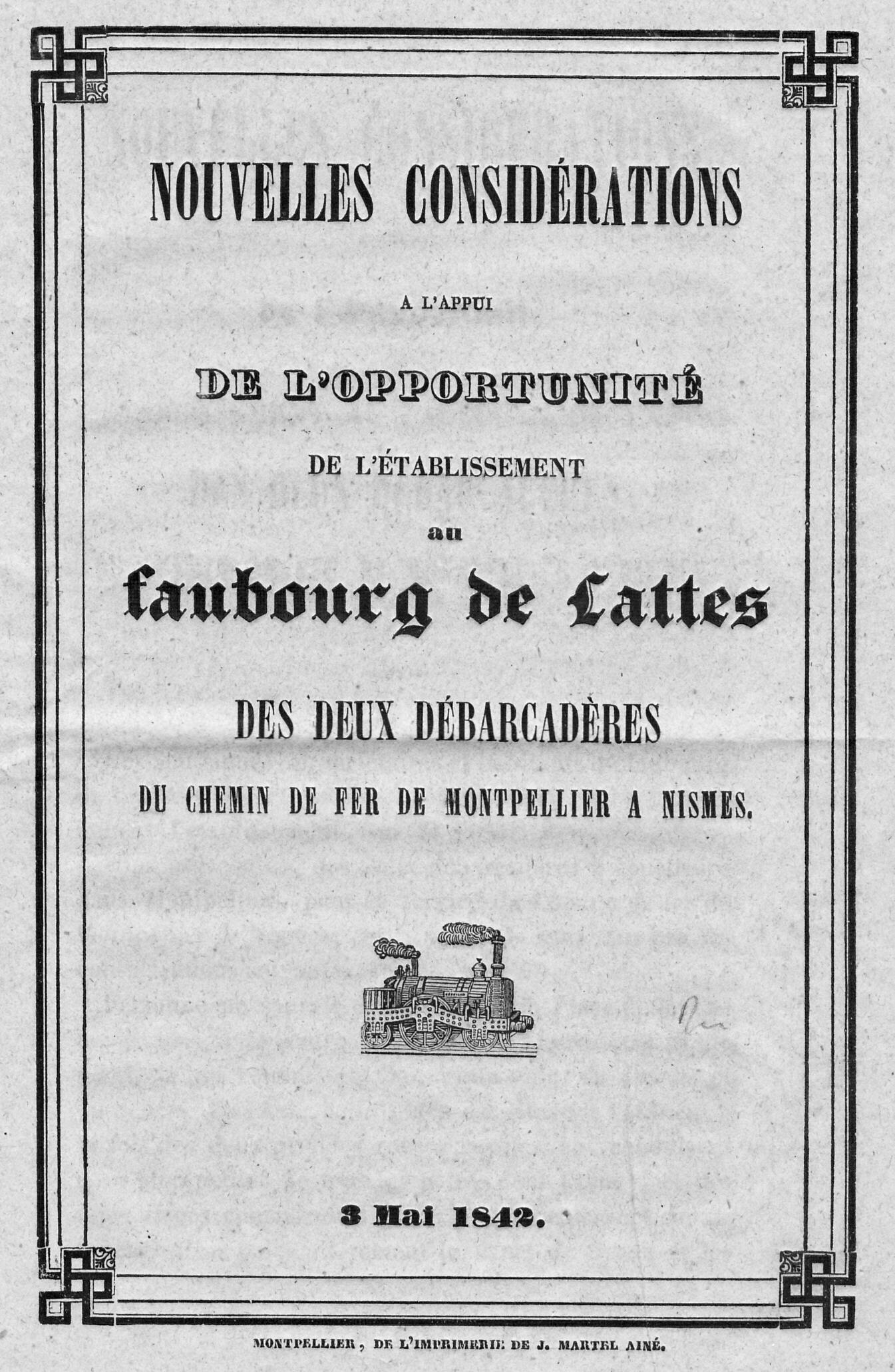 Fascicule broché de 12 pages, sans illustration.